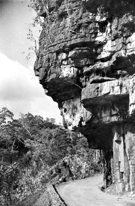 Repronegatief. De weg tussen Makassar en Watampone bij de eerste pas van Maros, Zuid-Celebes